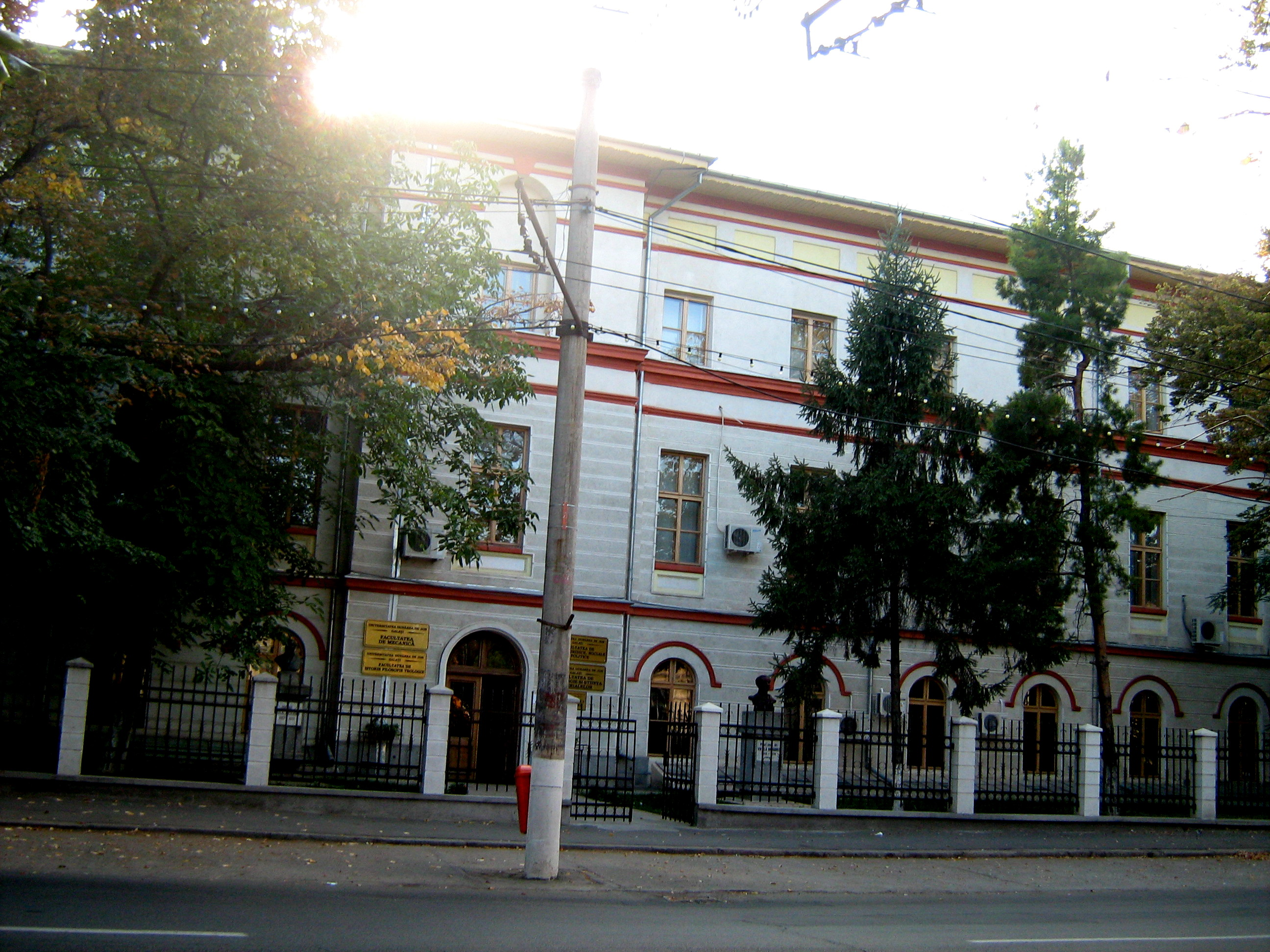 Galati - Institutul Notre Dame de Sion azi Facultatea de Mecanica